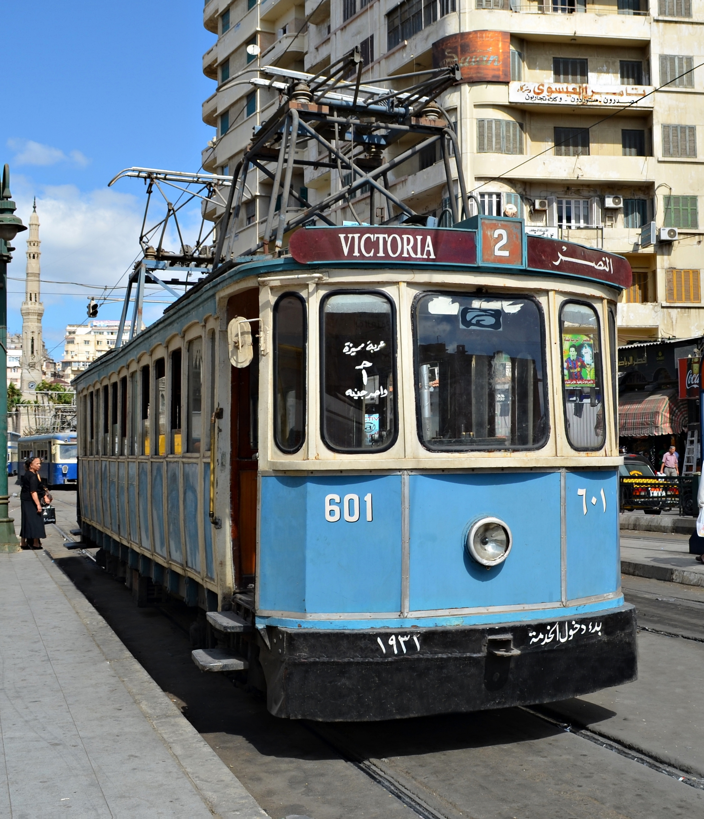 عربة ترام قديمة منذ عام 1931 على خط باكوس - الرمل بالإسكندريّة